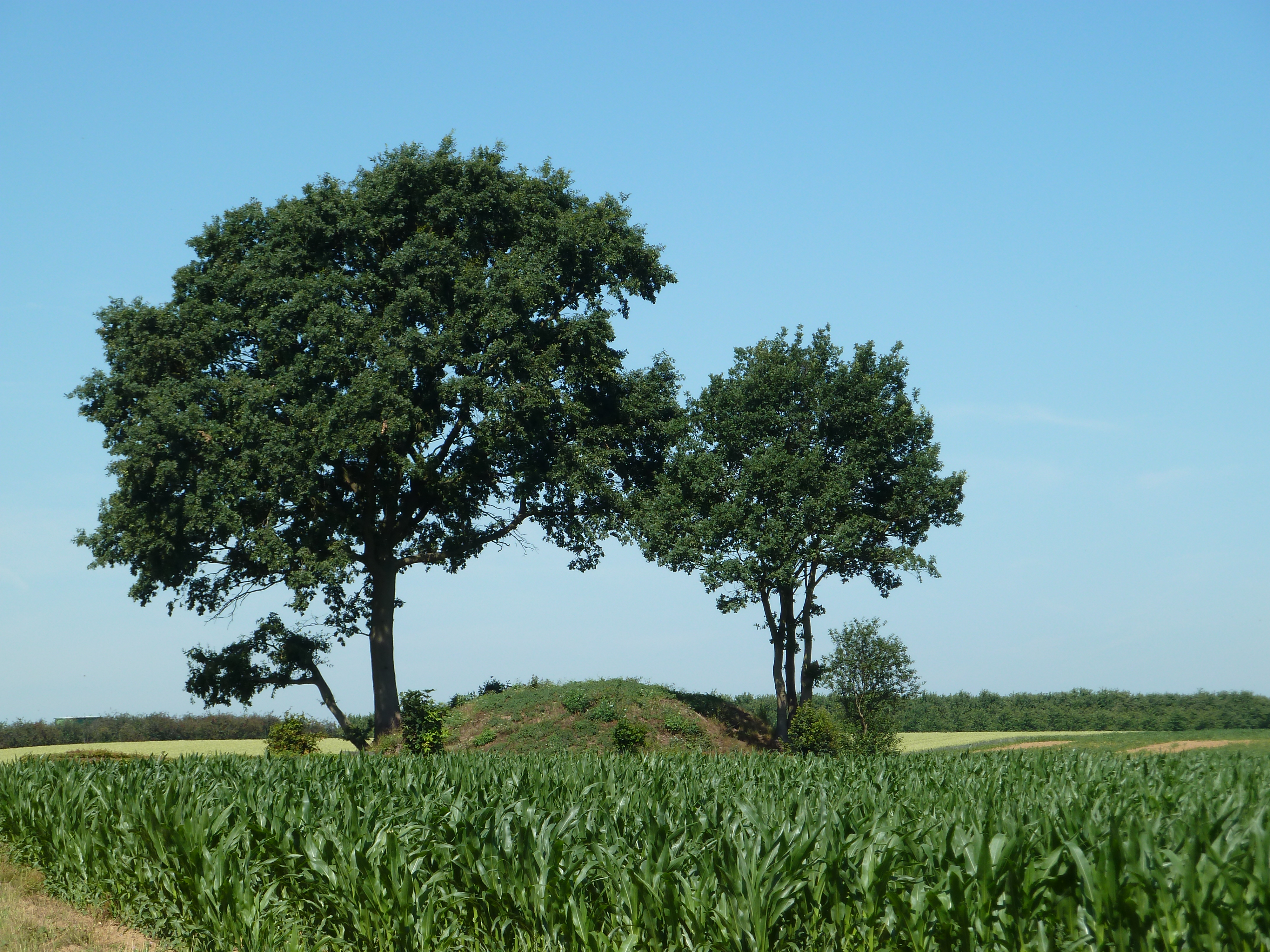 Tumulus de Vechmaal, Vechmaal, Heers, Belgique